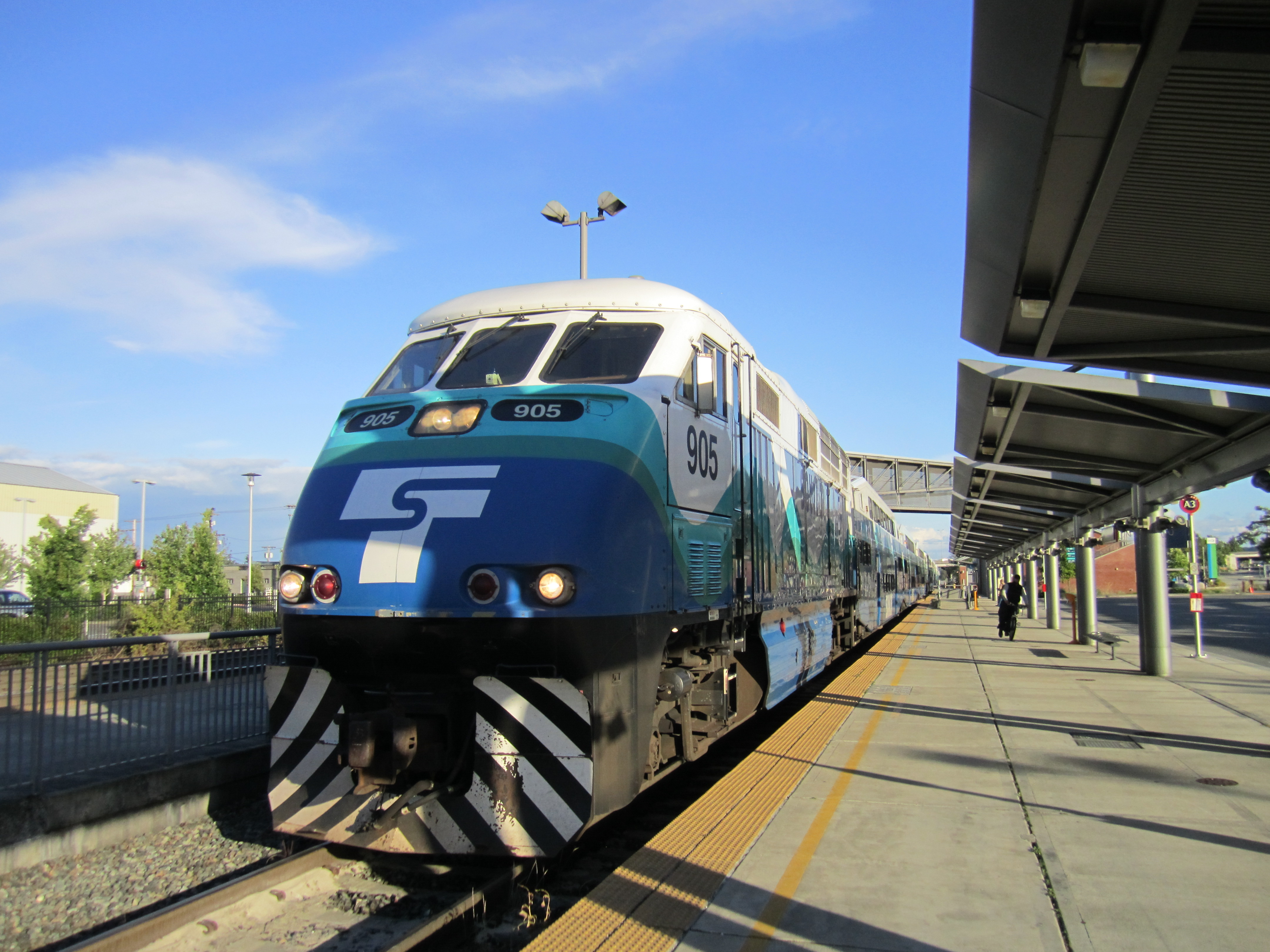 Sounder 905 at Everett Station